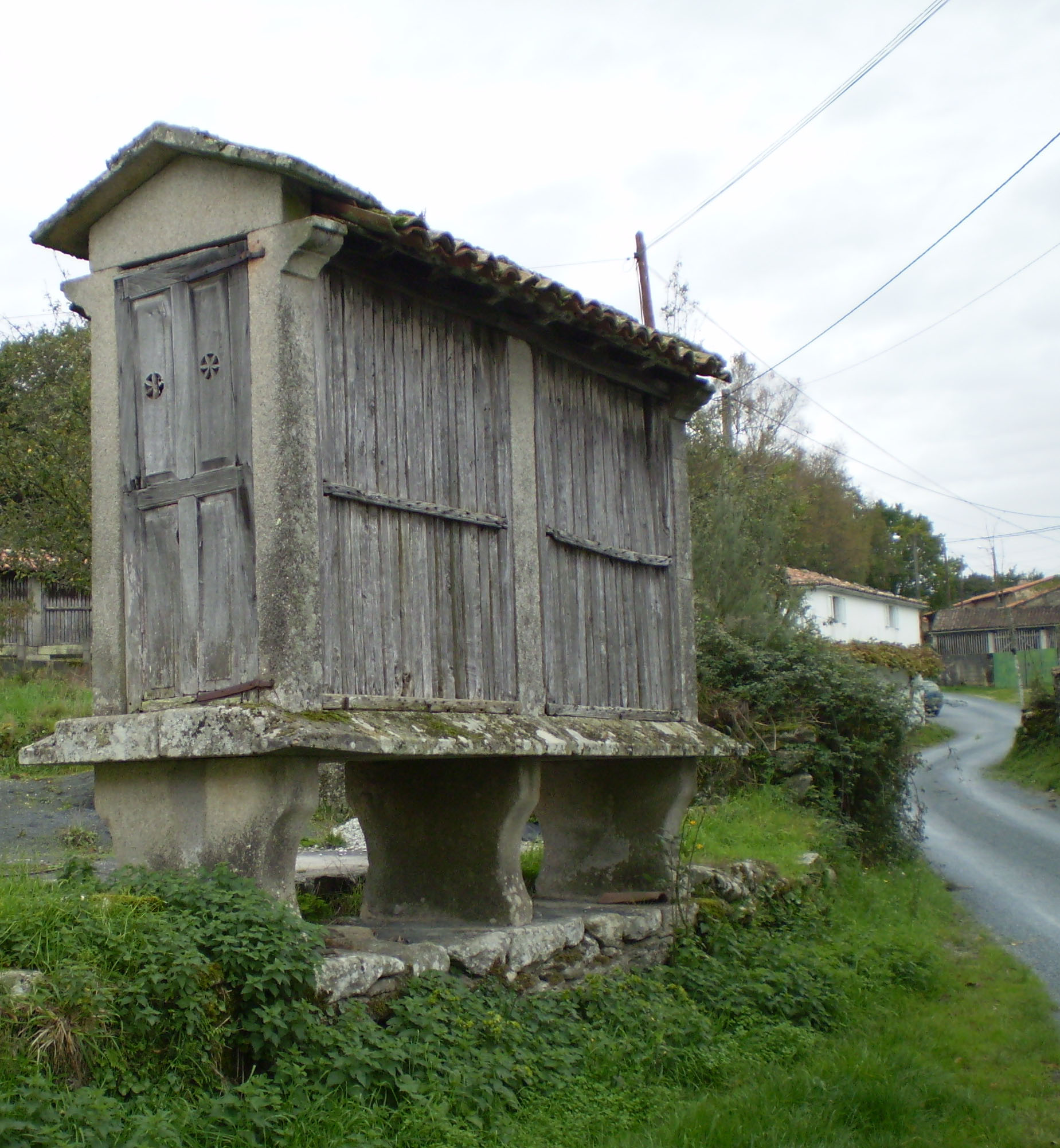 Hórreo de dous claros, sobre cepas asentadas no valo da aira. Porta penal.